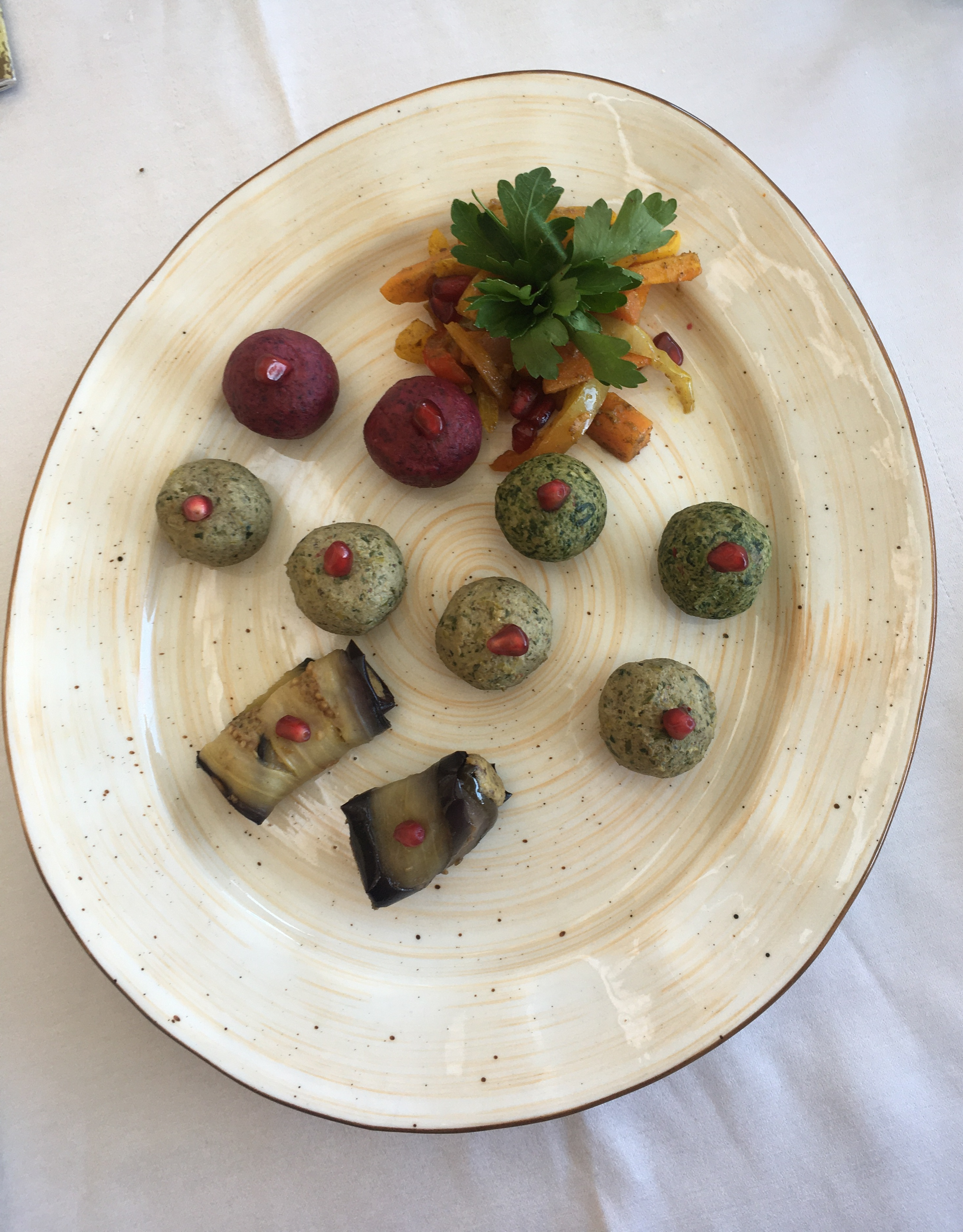 Пхали - ассорти (кафе Миндаль - Санкт-Петербург)